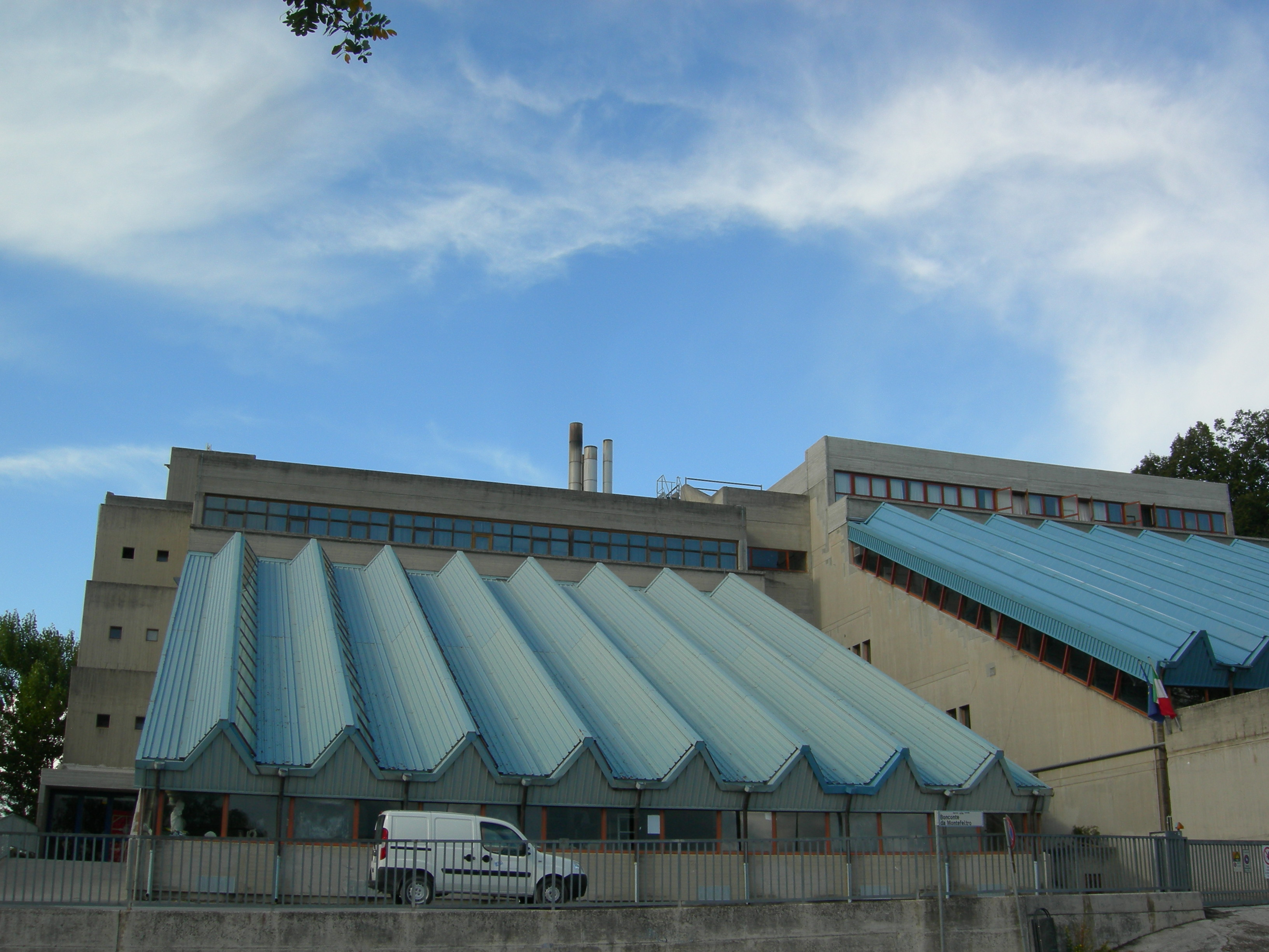 Veduta laterale dell'edificio del Liceo Artistico Scuola del Libro di Urbino